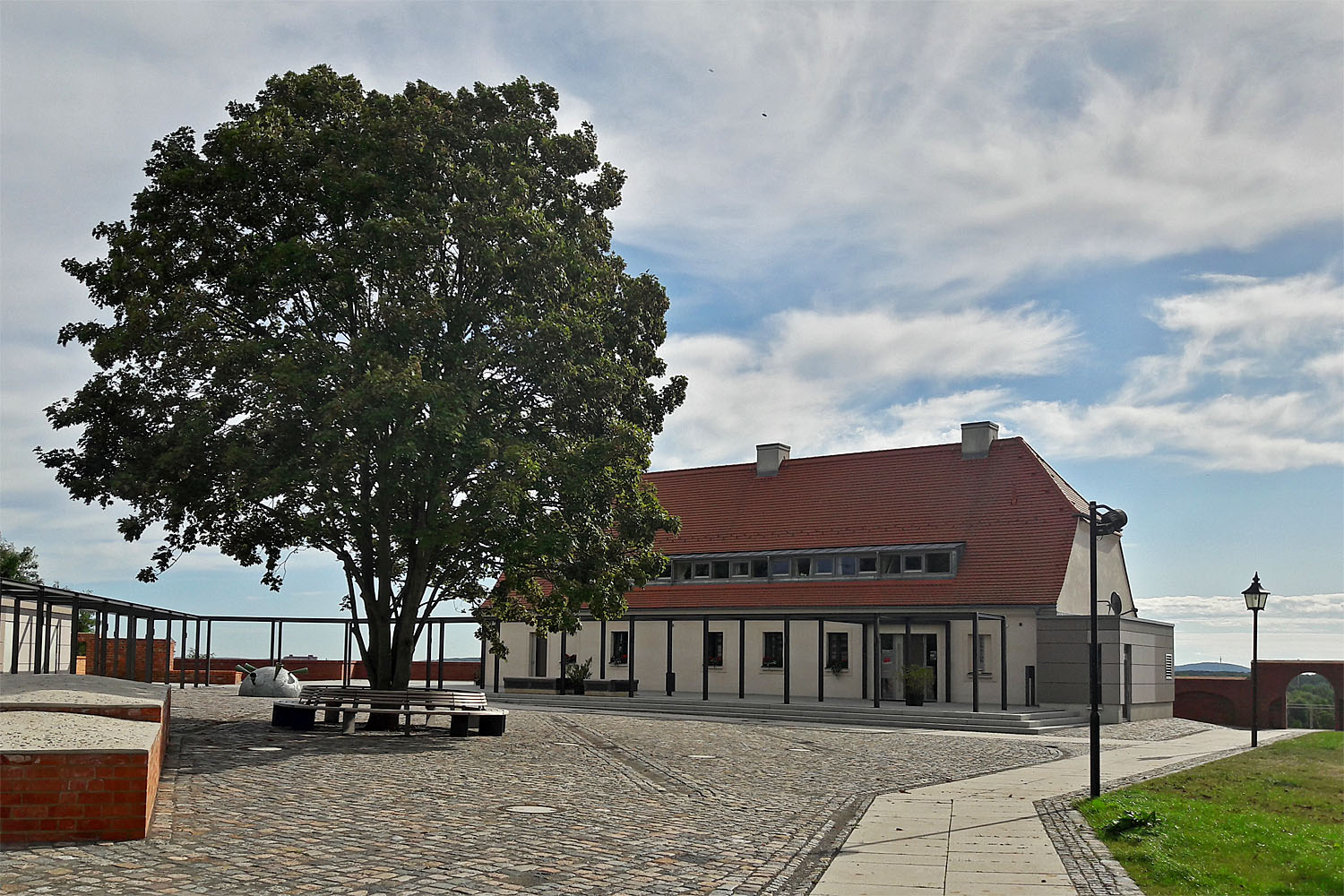 Pension Heinzelberge auf dem Burgberg Eilenburg